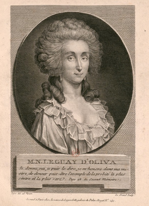 Gravure du temps, conservée au cabinet des estampes de la BNF.